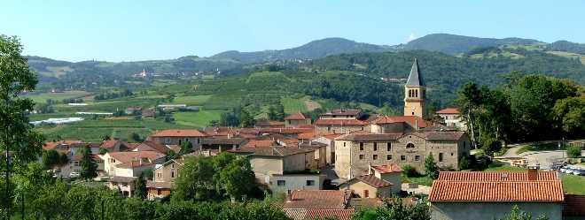 Thurins vu en hauteur